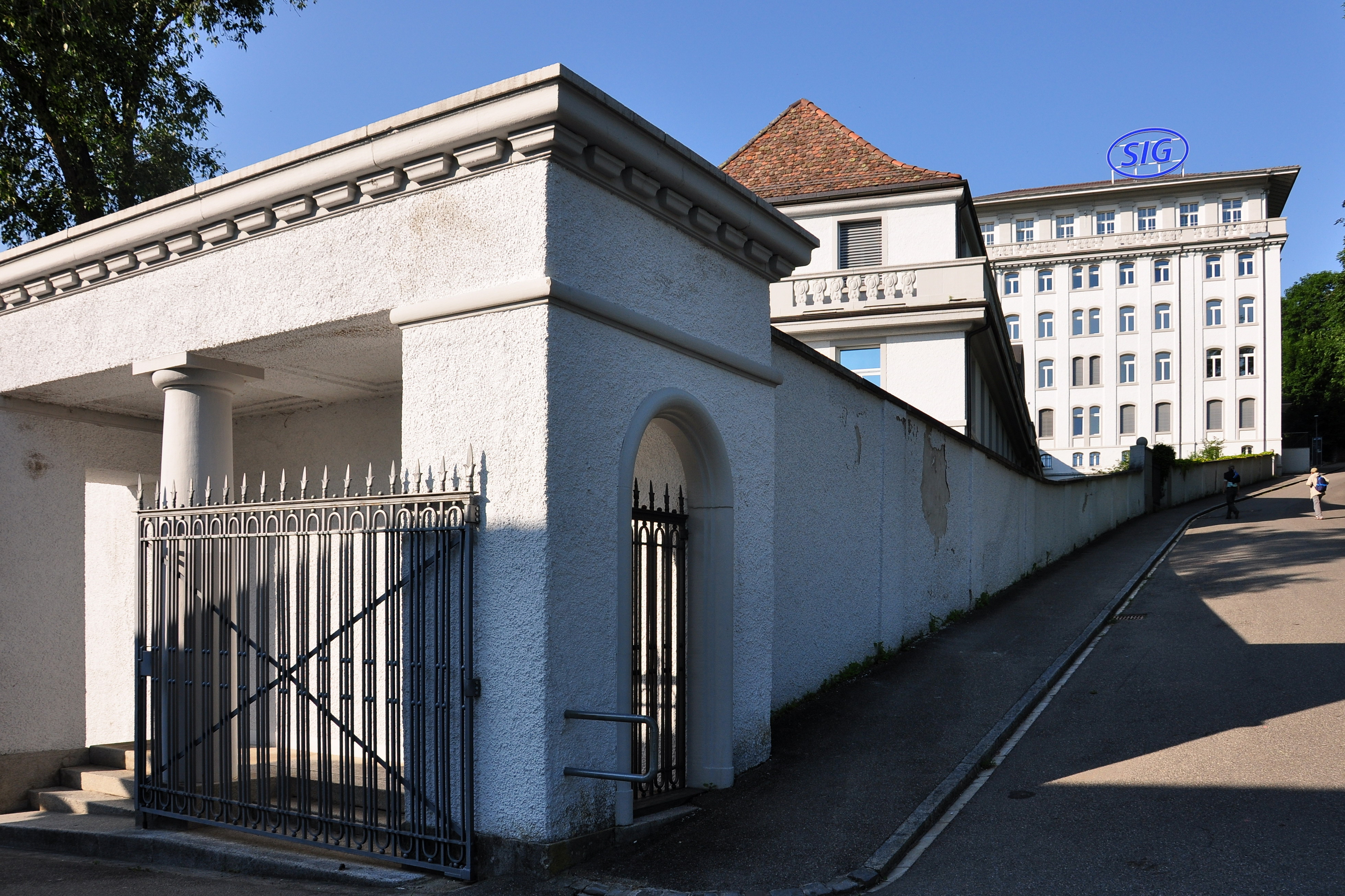 SIG building in Neuhausen am Rheinfall (Switzerland)